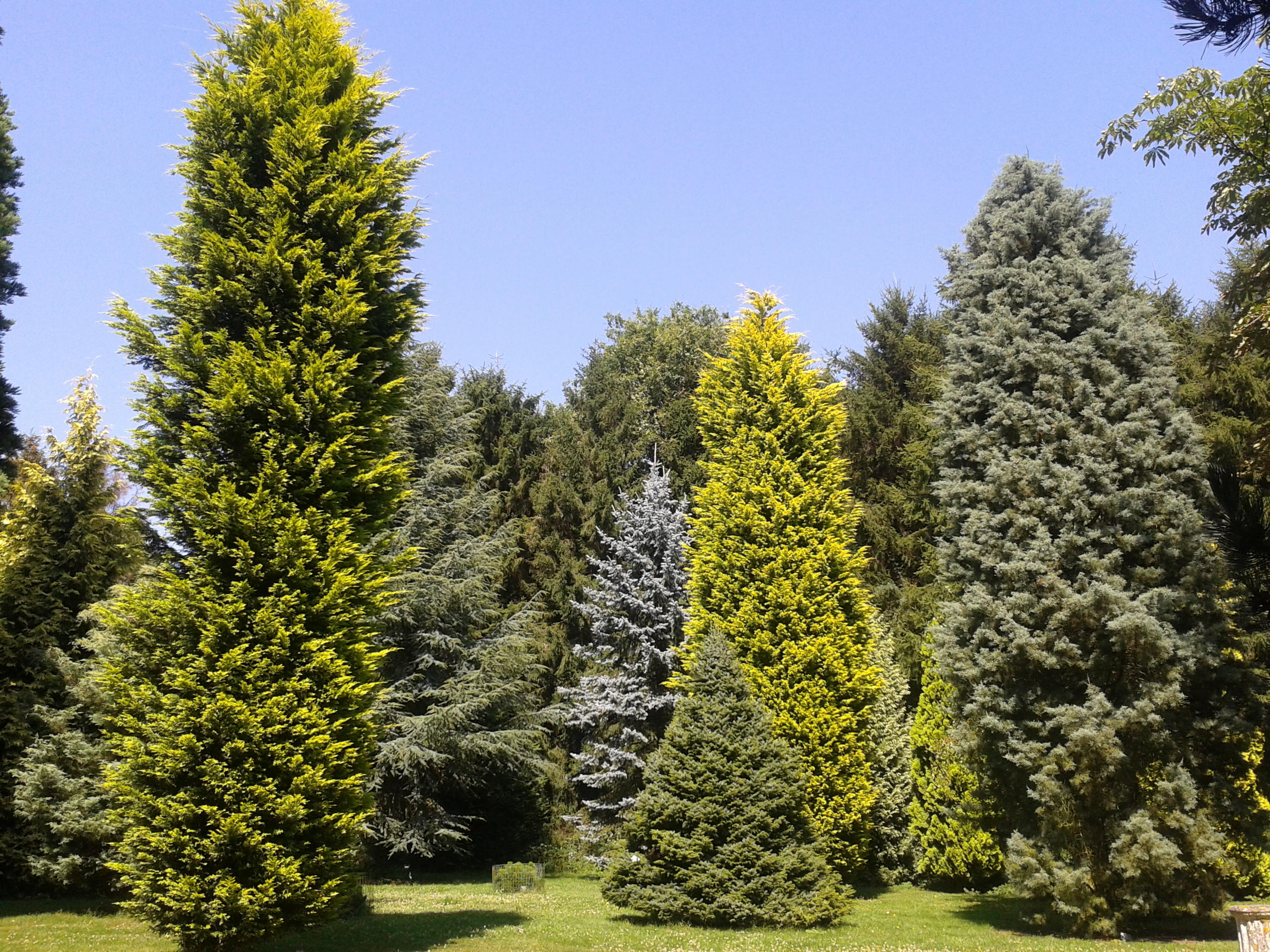 Parc arboretum du manoir aux loups, Halluin, classé jardin remarquable